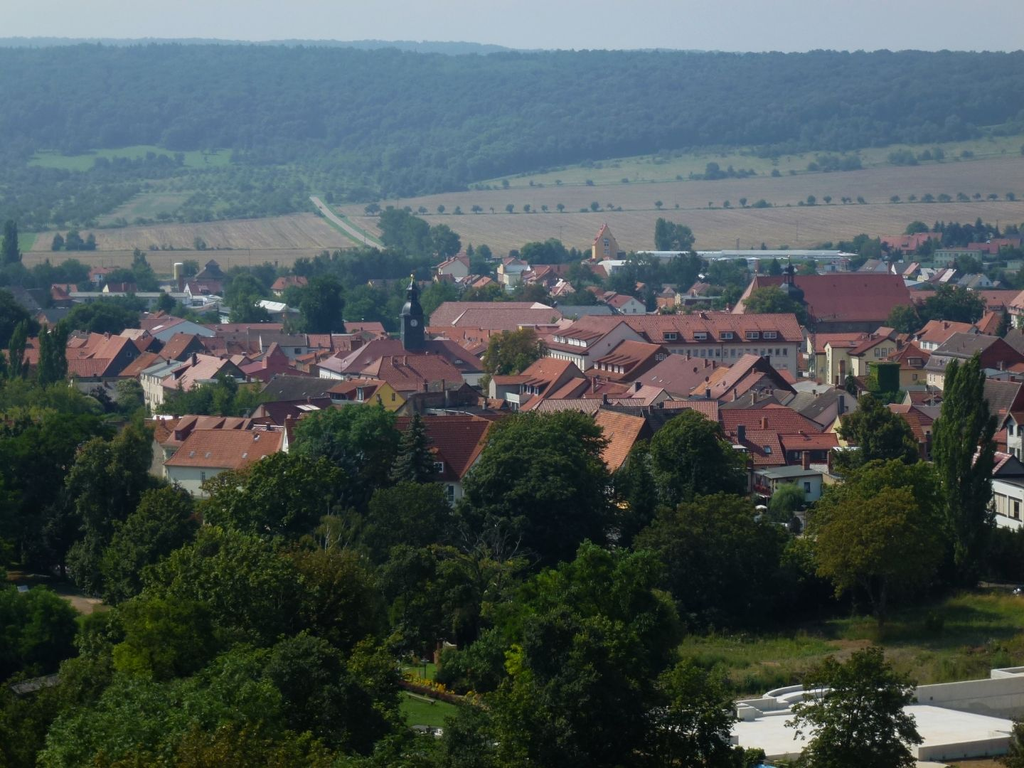 Blick auf Bad Frankenhausen vom Gelände des Hausmannsturms (im Hintergrund die östliche Windleite)